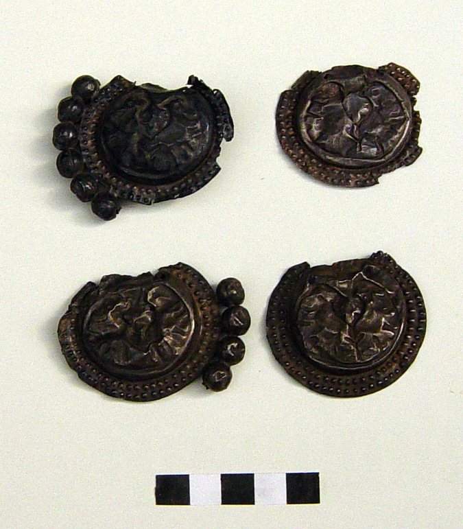 Жаночае ўпрыгожваенне перыяду сярэднявечча. З фондаў Гродзенскага дзяржаўнага гісторыка-археалагічнага музея